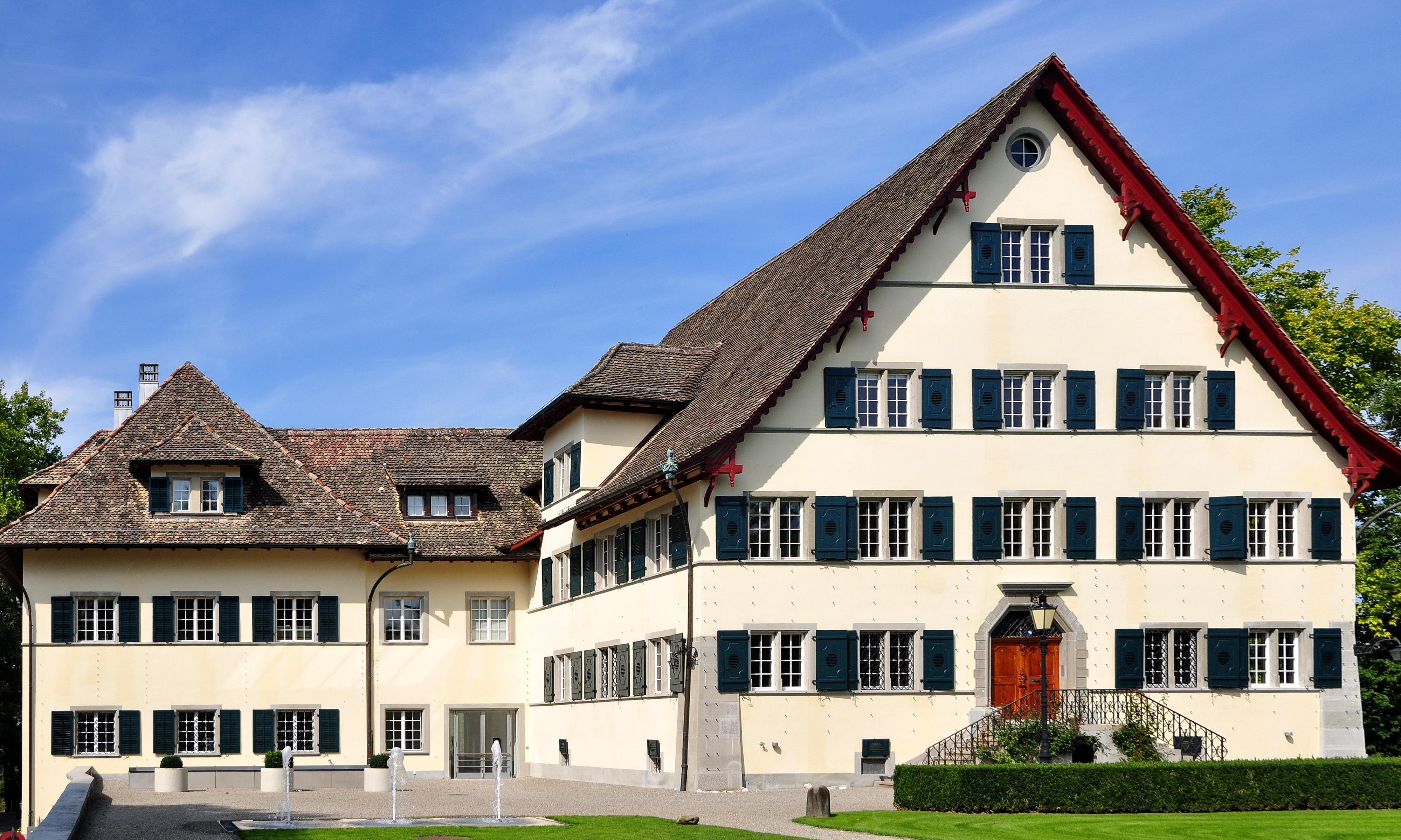 Landgut Bocken, Hauptgebäude, Bockenweg in Horgen (Switzerland)